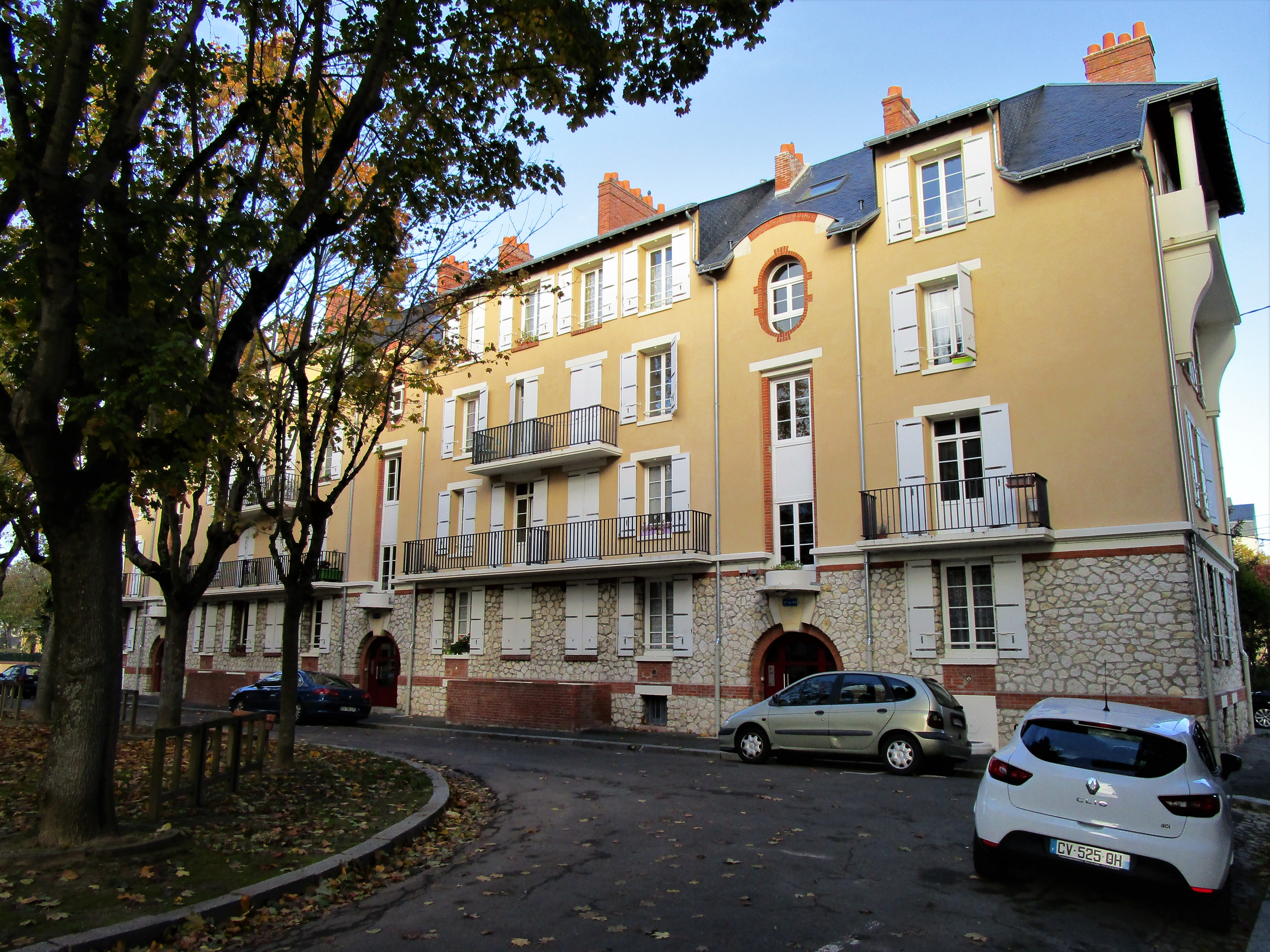 La cité-jardin Bords de Loire dans le quartier Lamartine de Tours.